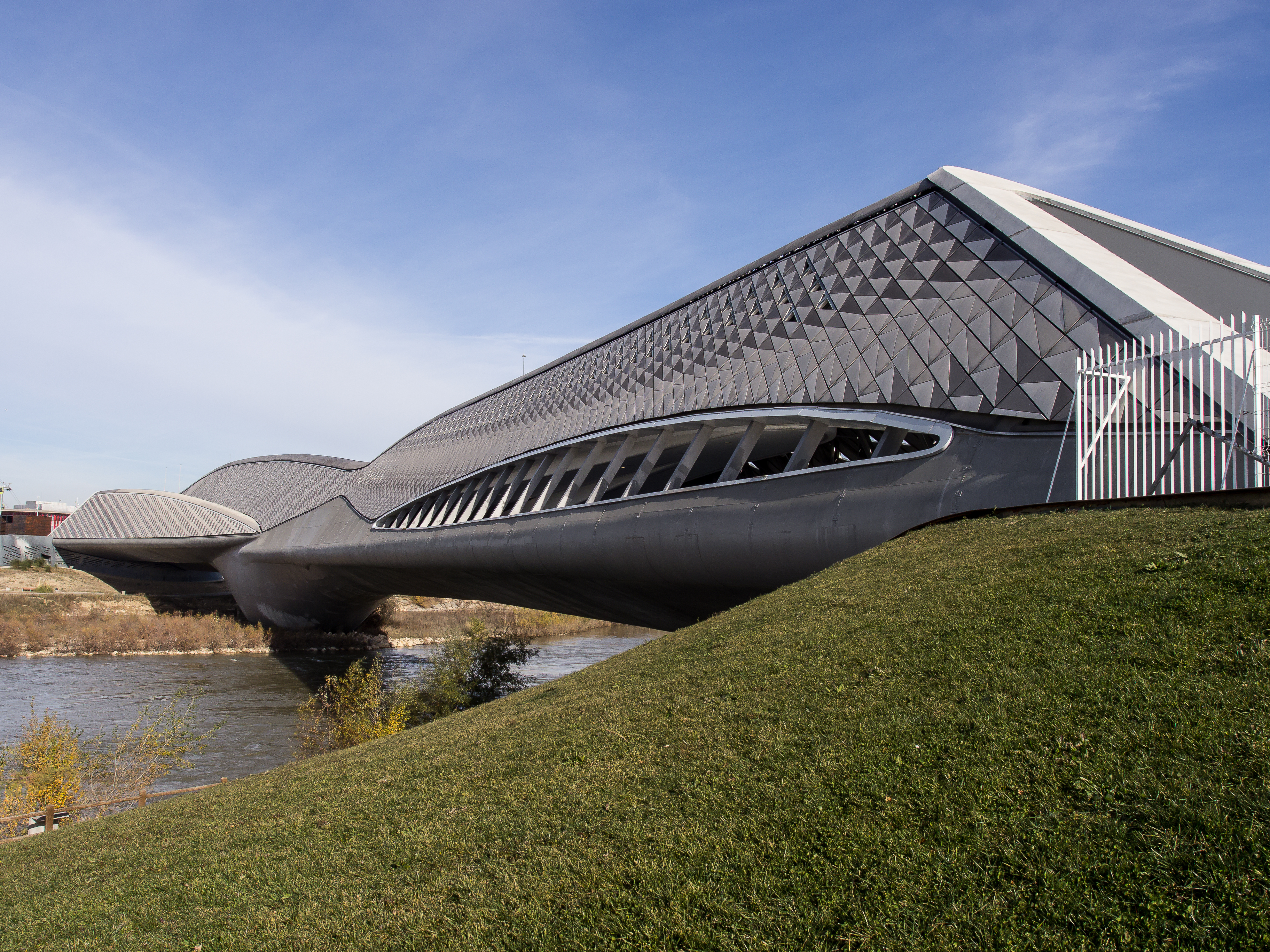 Pabellón puente